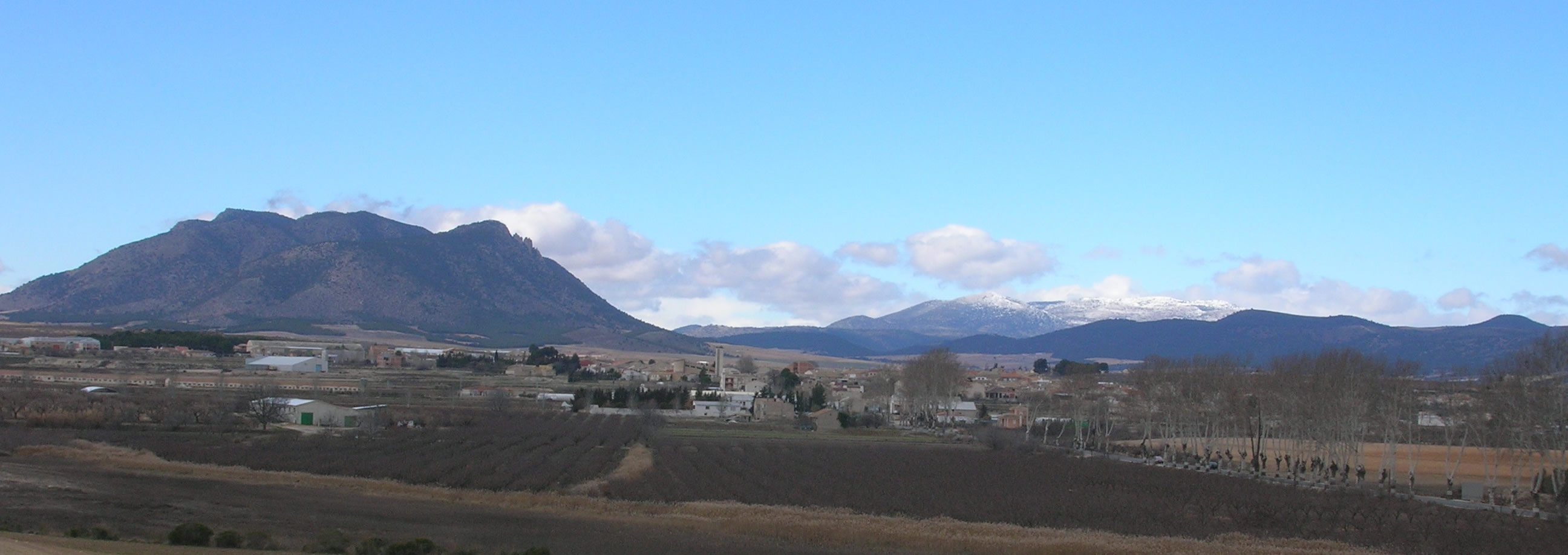 Pedanía de Barranda, del municipio de Caravaca de la Cruz, en Murcia, España. Fotografía propia, cedida al dominio público.